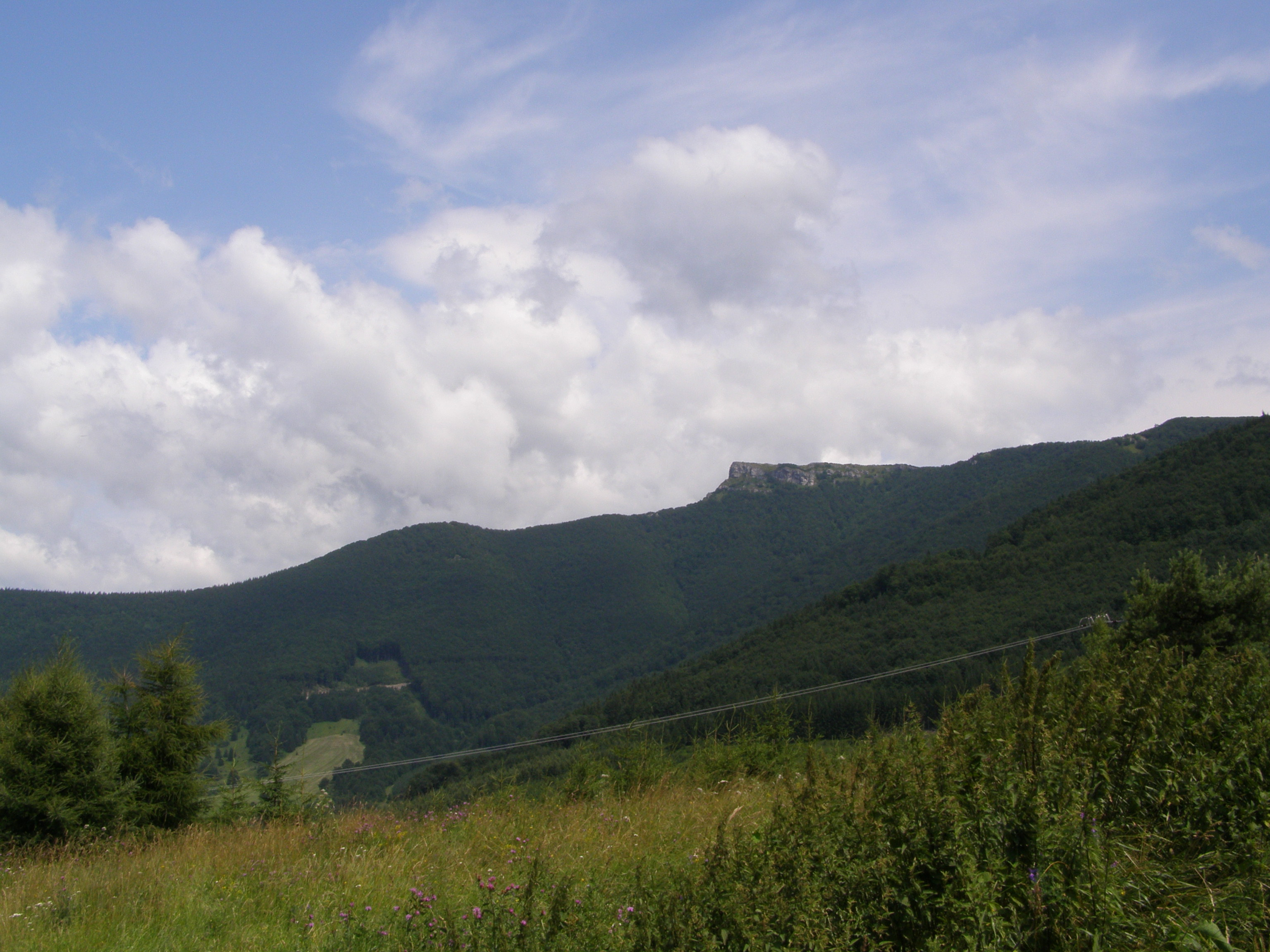 Lúčanská Fatra, Kľak (1352 m), pohled z Fačkovského sedla